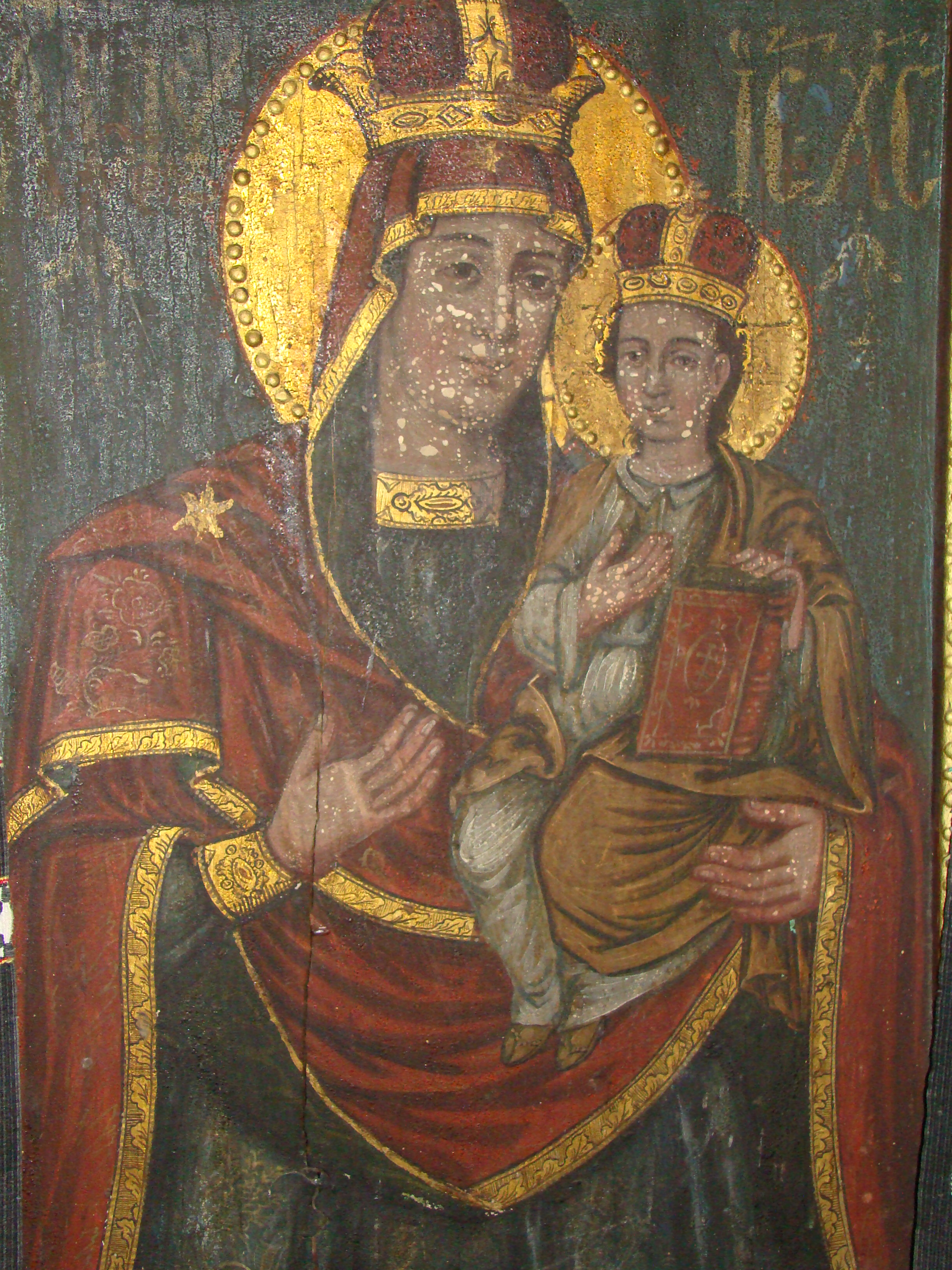 Biserica de lemn „Sf.Nicolae” din Căraci-Hunedoara